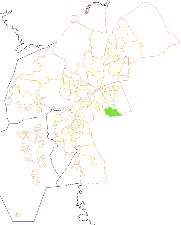 Karta som visar primärområdes belägenhet i Göteborg